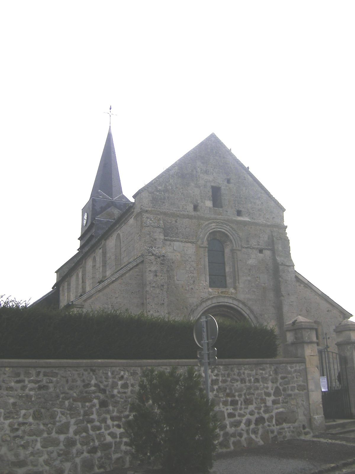 Royaucourt